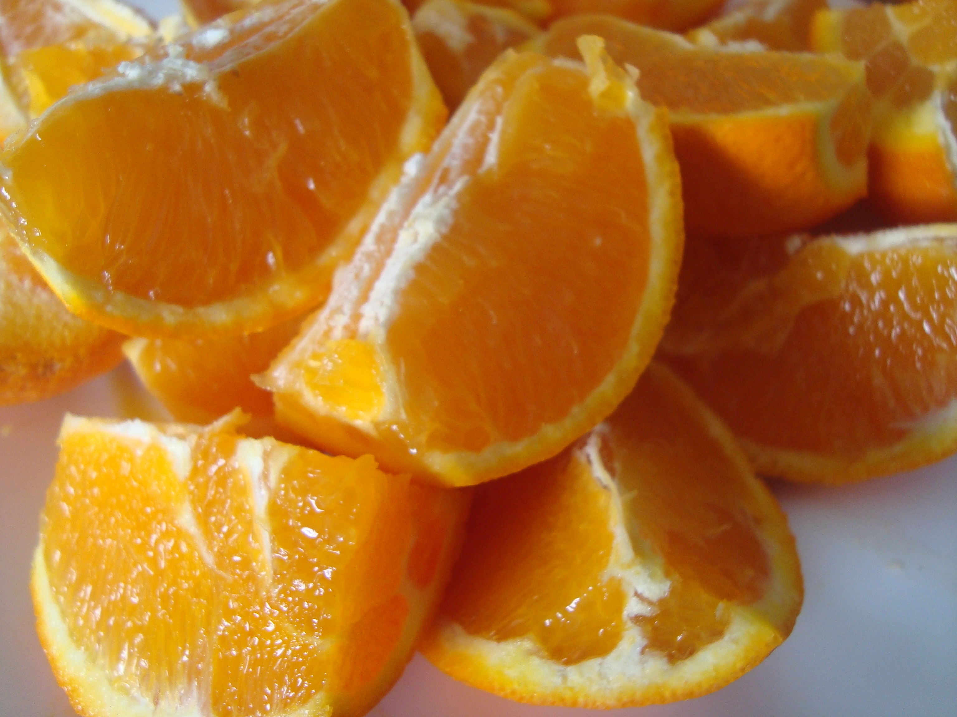 Naranjas, gajos de naranja con piel